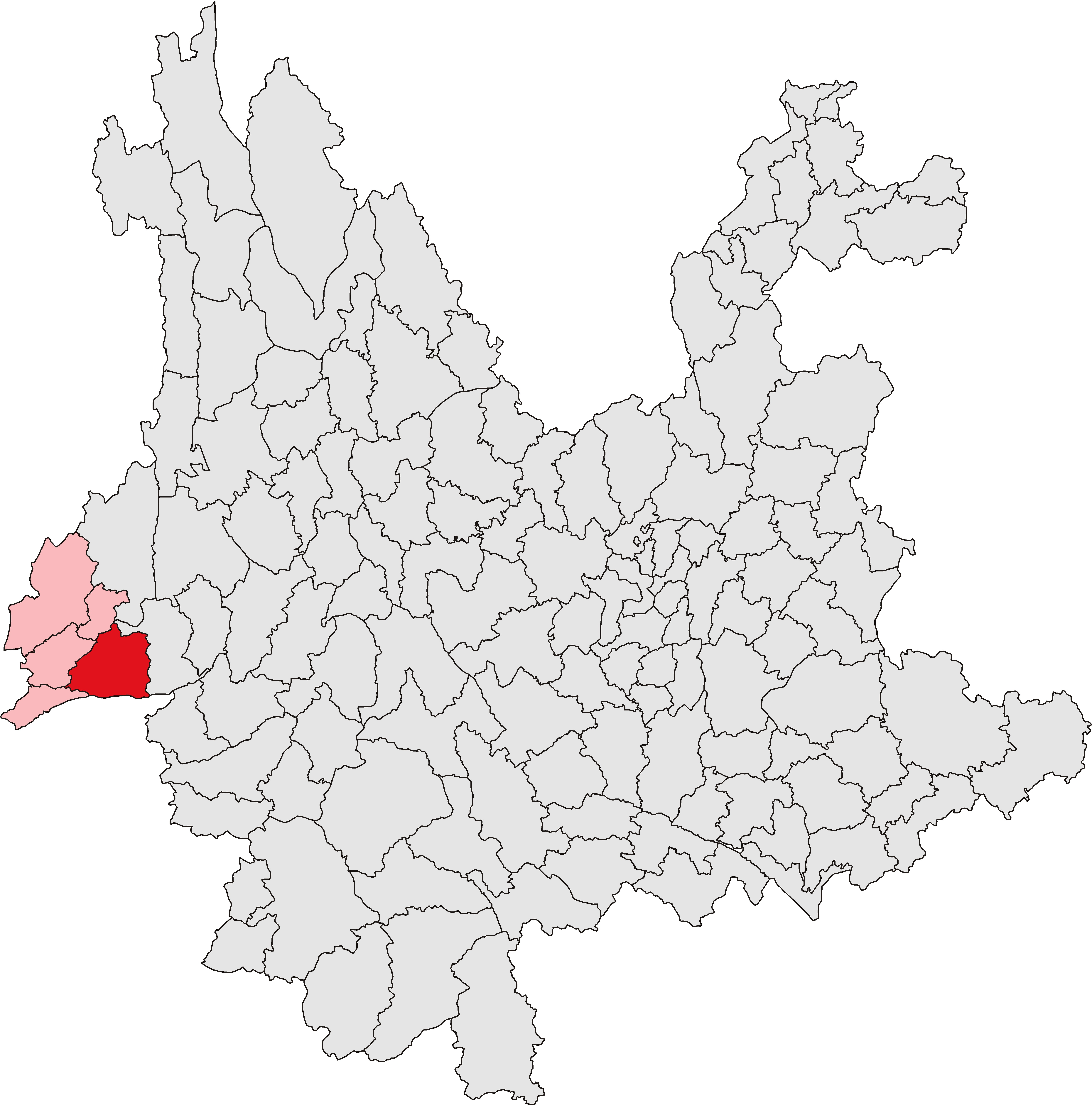 中文（中国大陆）: 芒市位置图